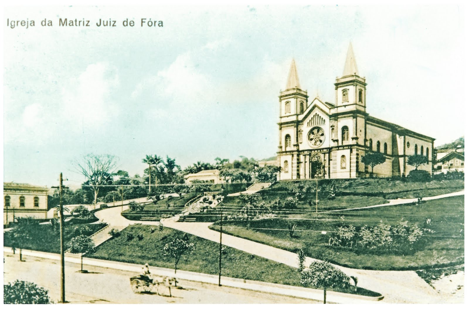 Catedral Metropolitana de Juiz de Fora, Brasil.